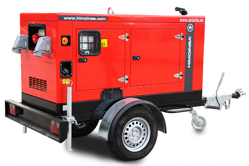 Himoinsa strømaggregat lyddempa på hjul som levert fra Østerbø Maskin AS